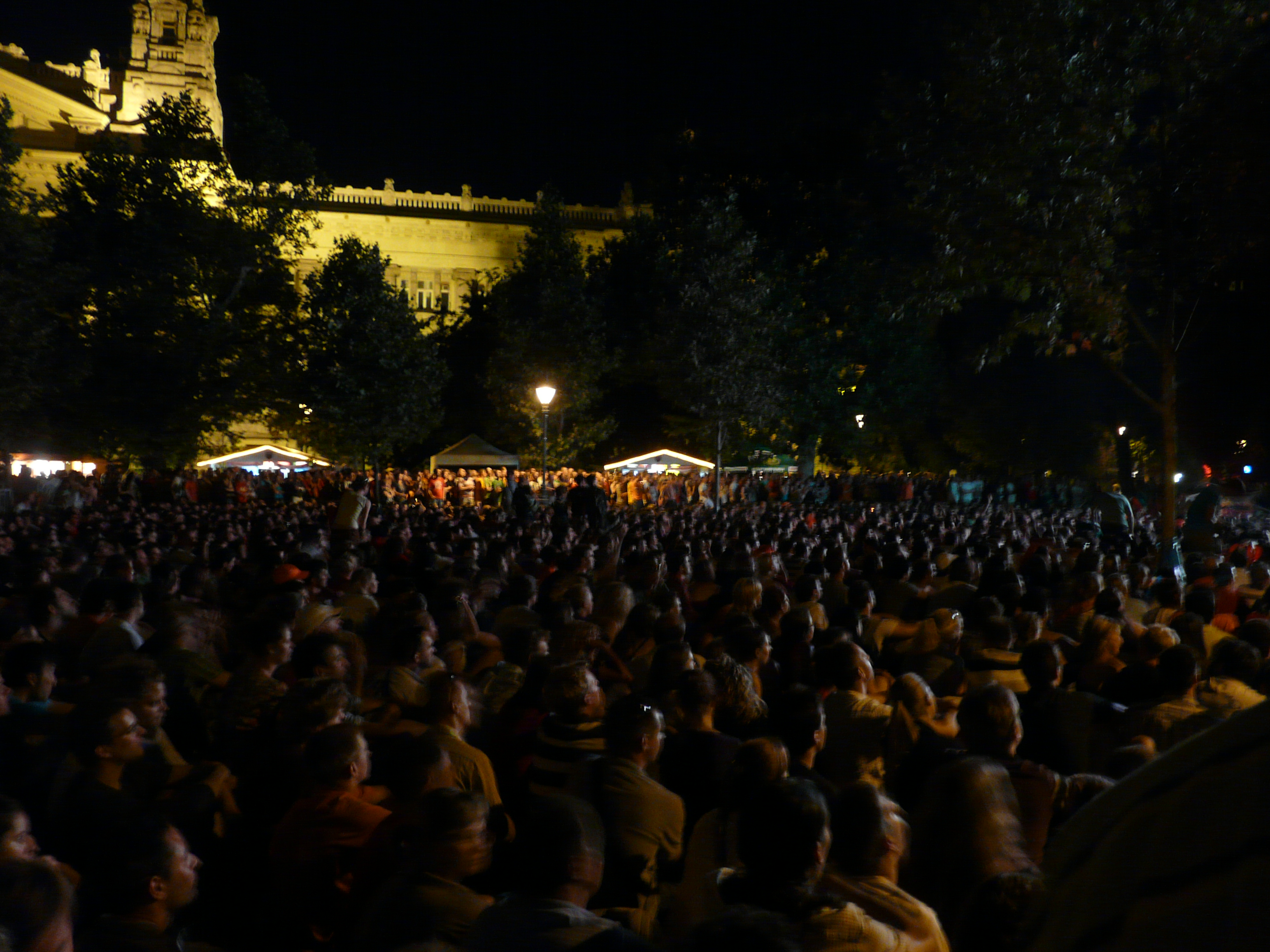 Budapest Belvárosában, a Szabadság téren kivetítőn nézi a közönség a spanyol-holland labdarúgó világbajnoki döntőt. A felvétel megjelent Creative Commons alatt a Metapolisz DVD sorozatban.